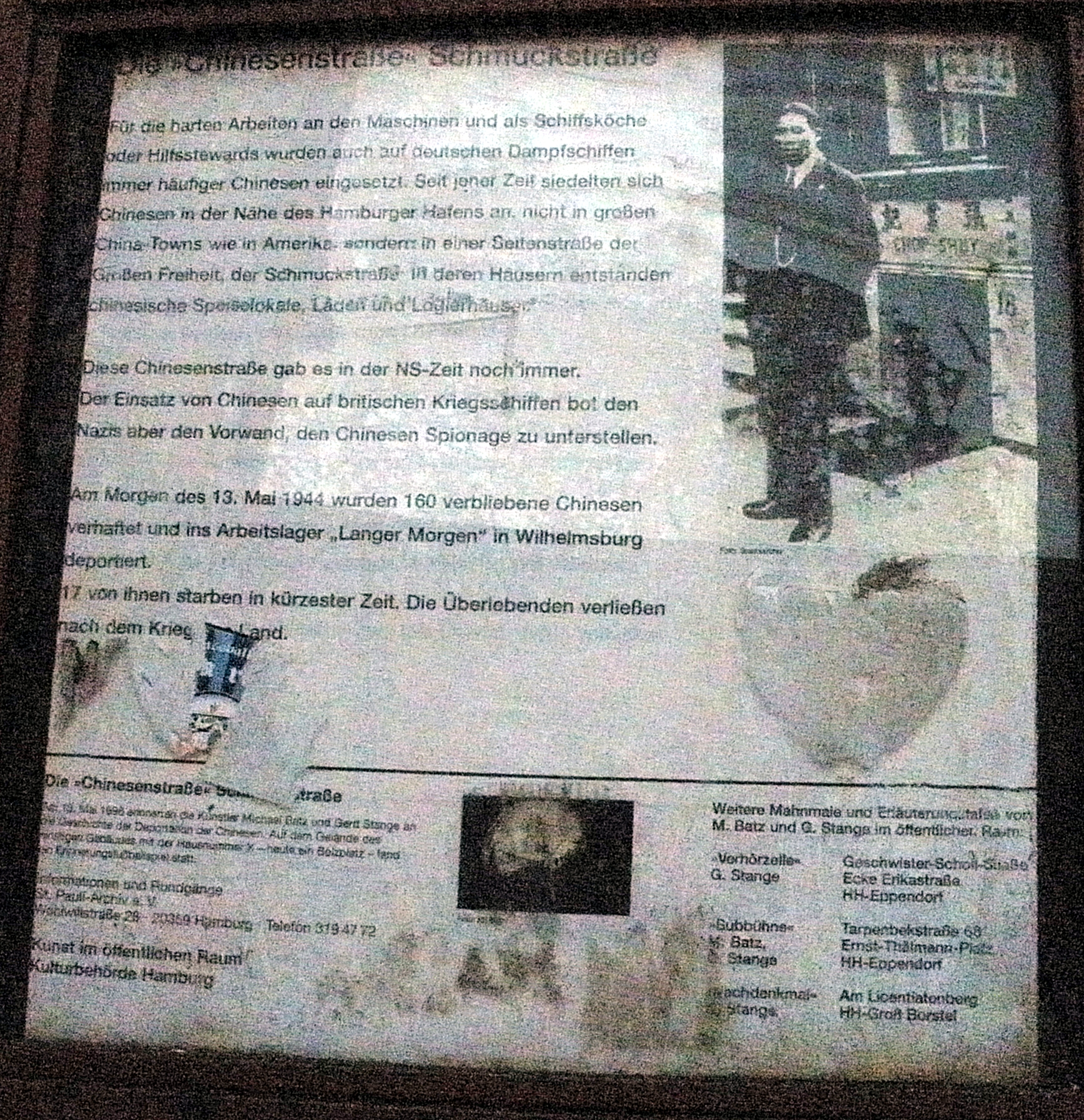 gedenktafel an das chinesenviertel in hamburg-St. Pauli, Schmuckstraße , Künstler: Gerd Stange